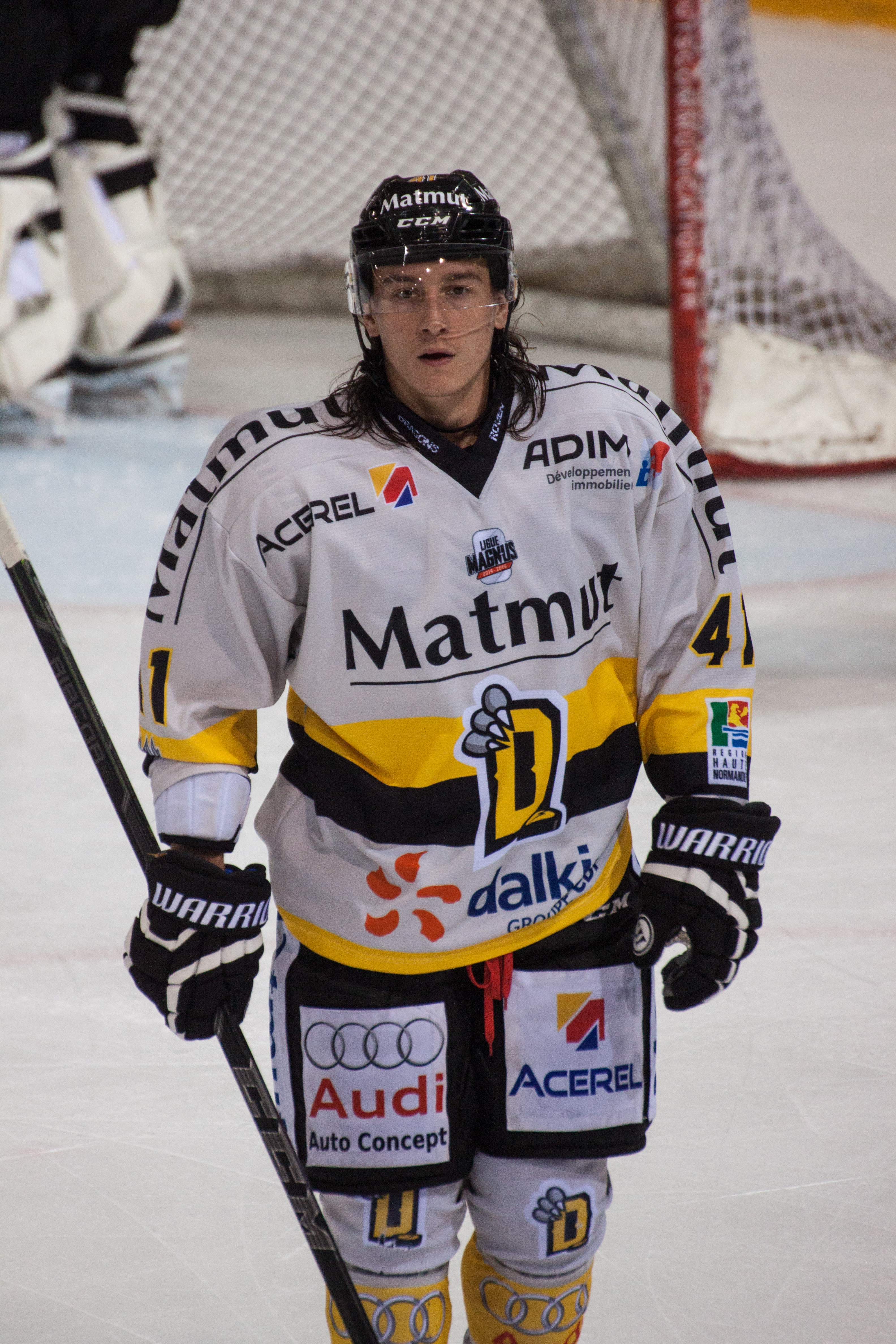 Wesley Cunningham lors du match Grenoble-Rouen le 24 octobre 2014 à la patinoire Polesud.